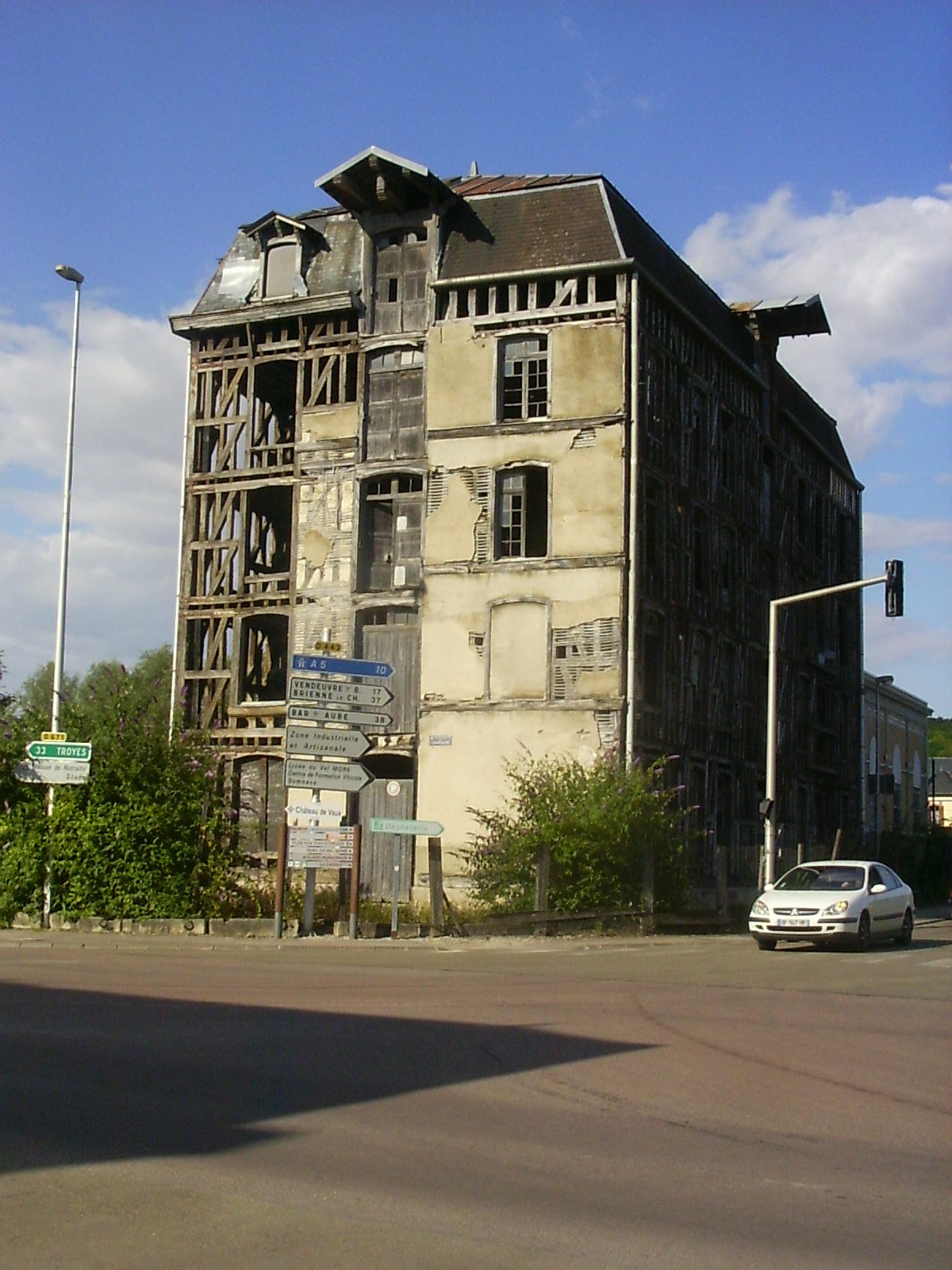 Bar-sur-Seine, watermolen